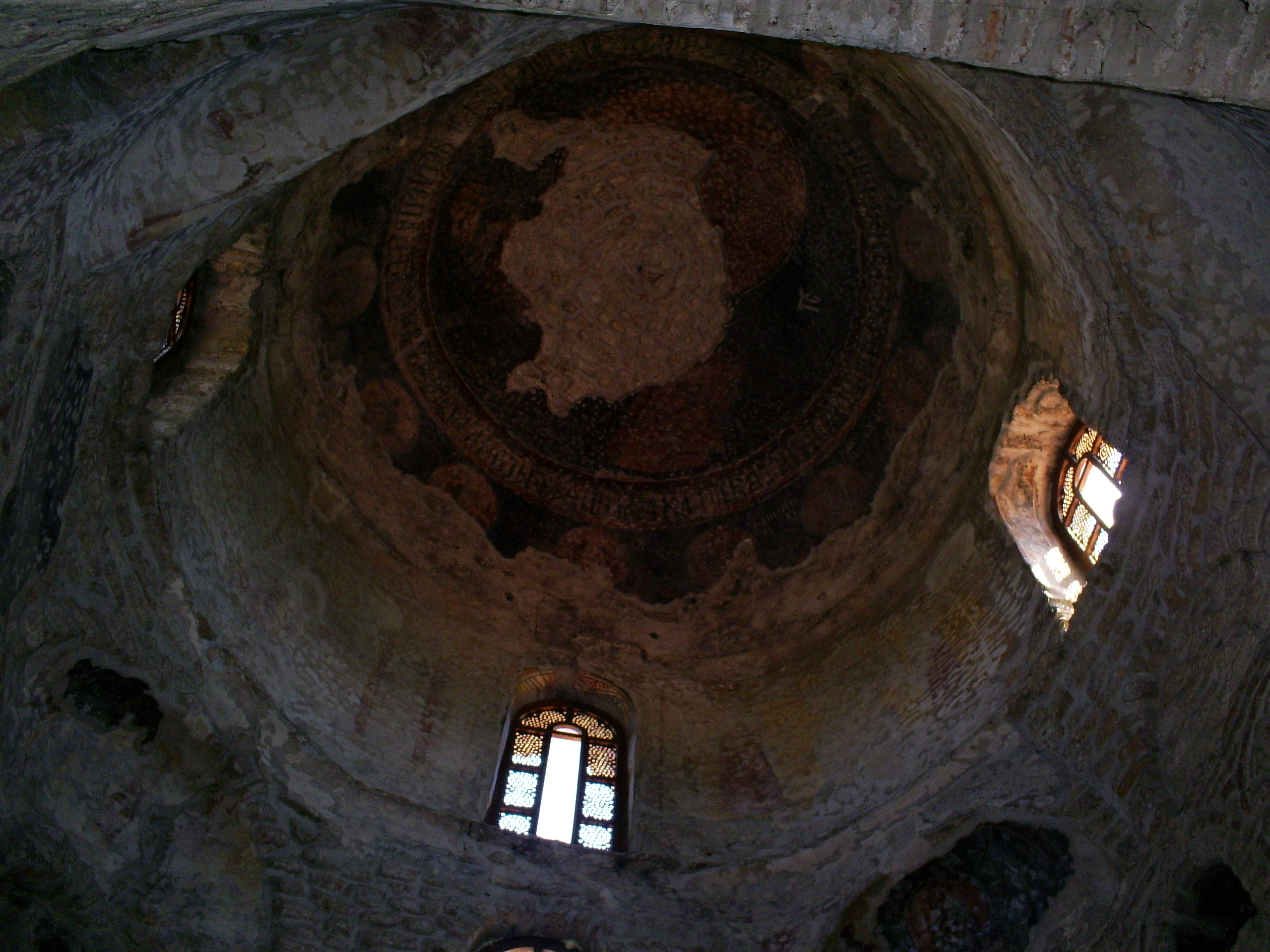 Petrova crkva - pogled na gore